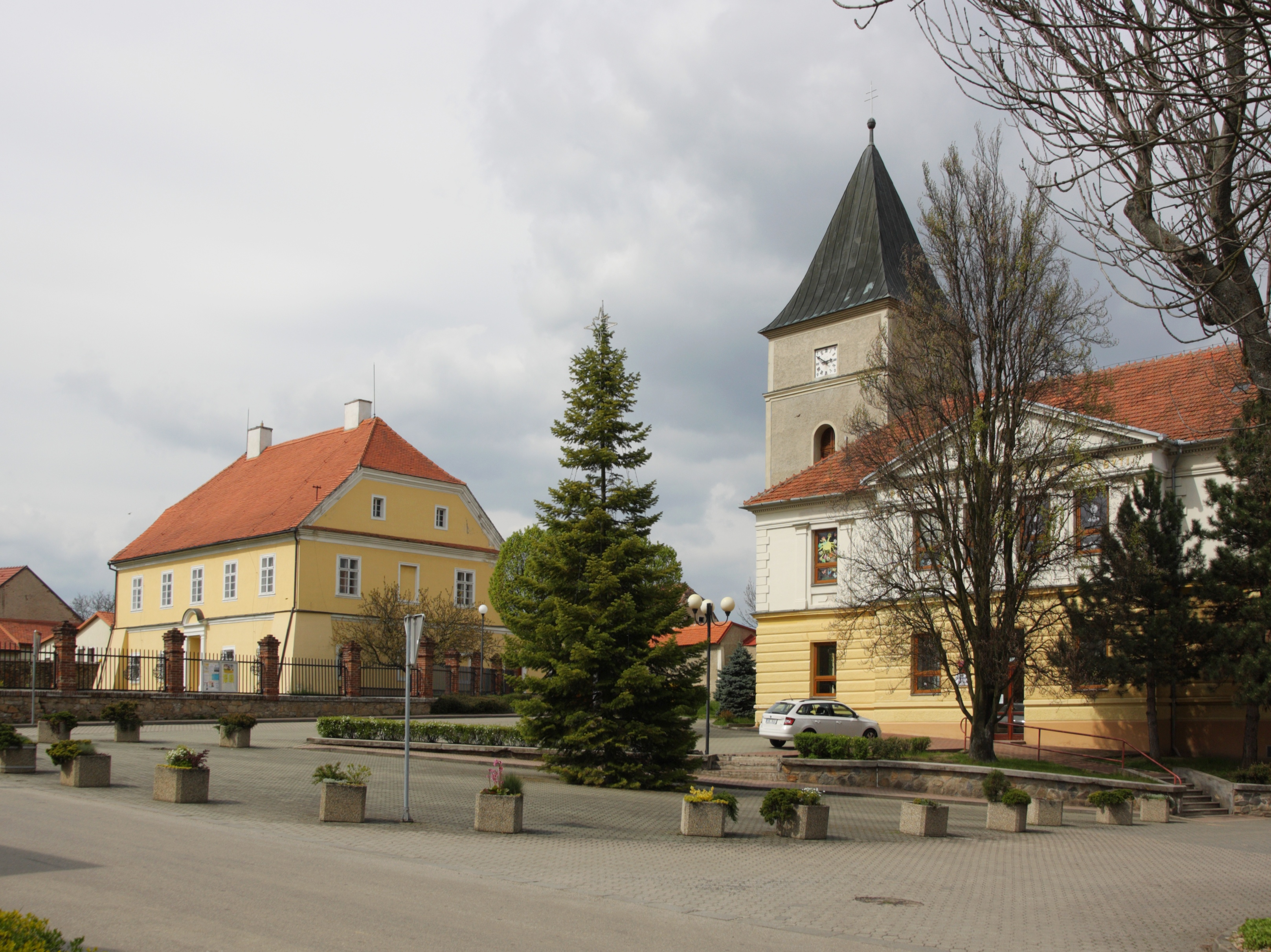 Mohelno - náměstí.